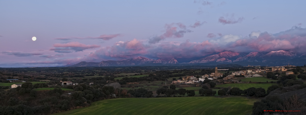 El primer amanecer de 2010 en la Sierra de Guara, a un lado la luna llena y al otro amaneciendo.